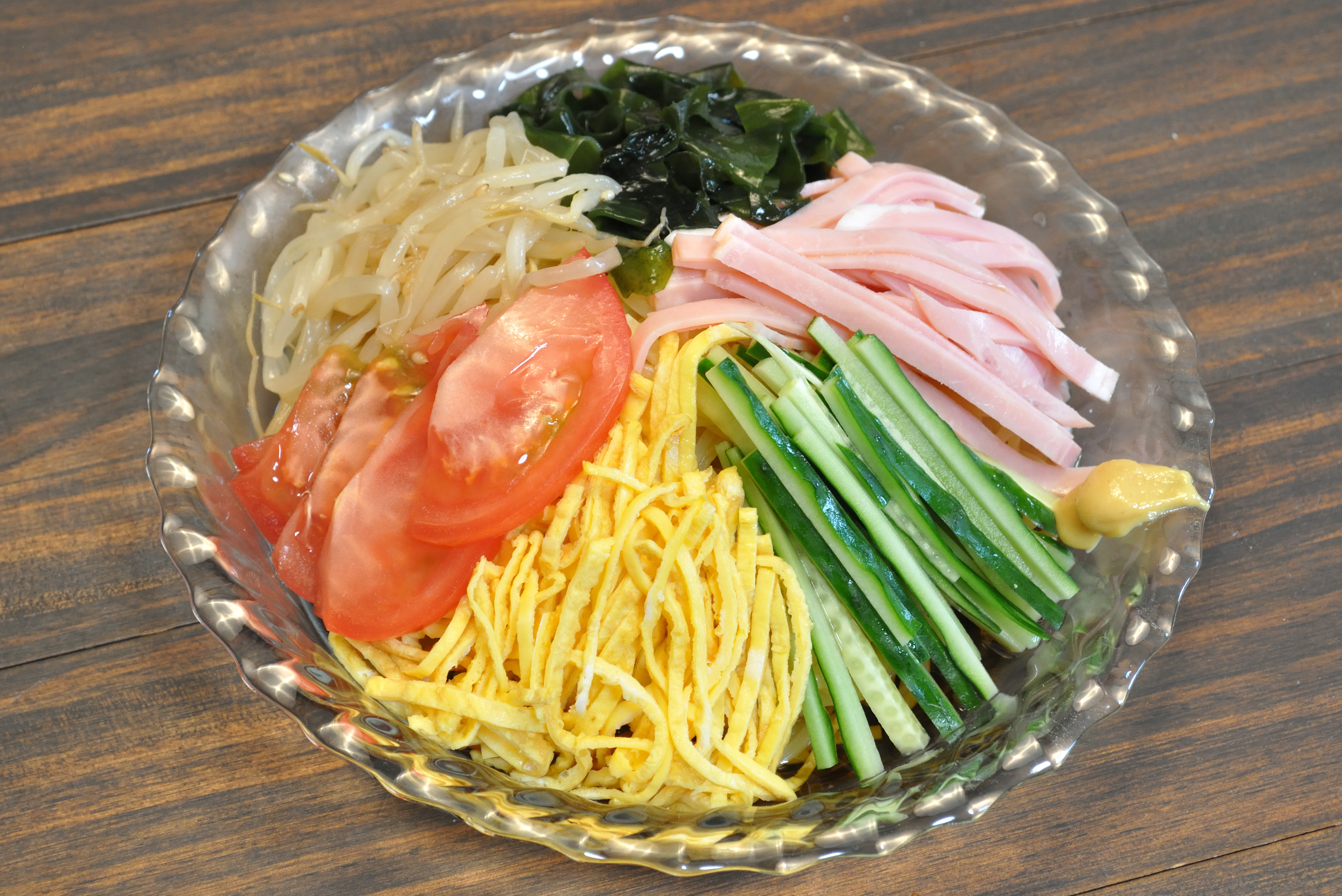 冷やし中華の参考画像